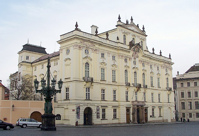 Bilder aus Prag